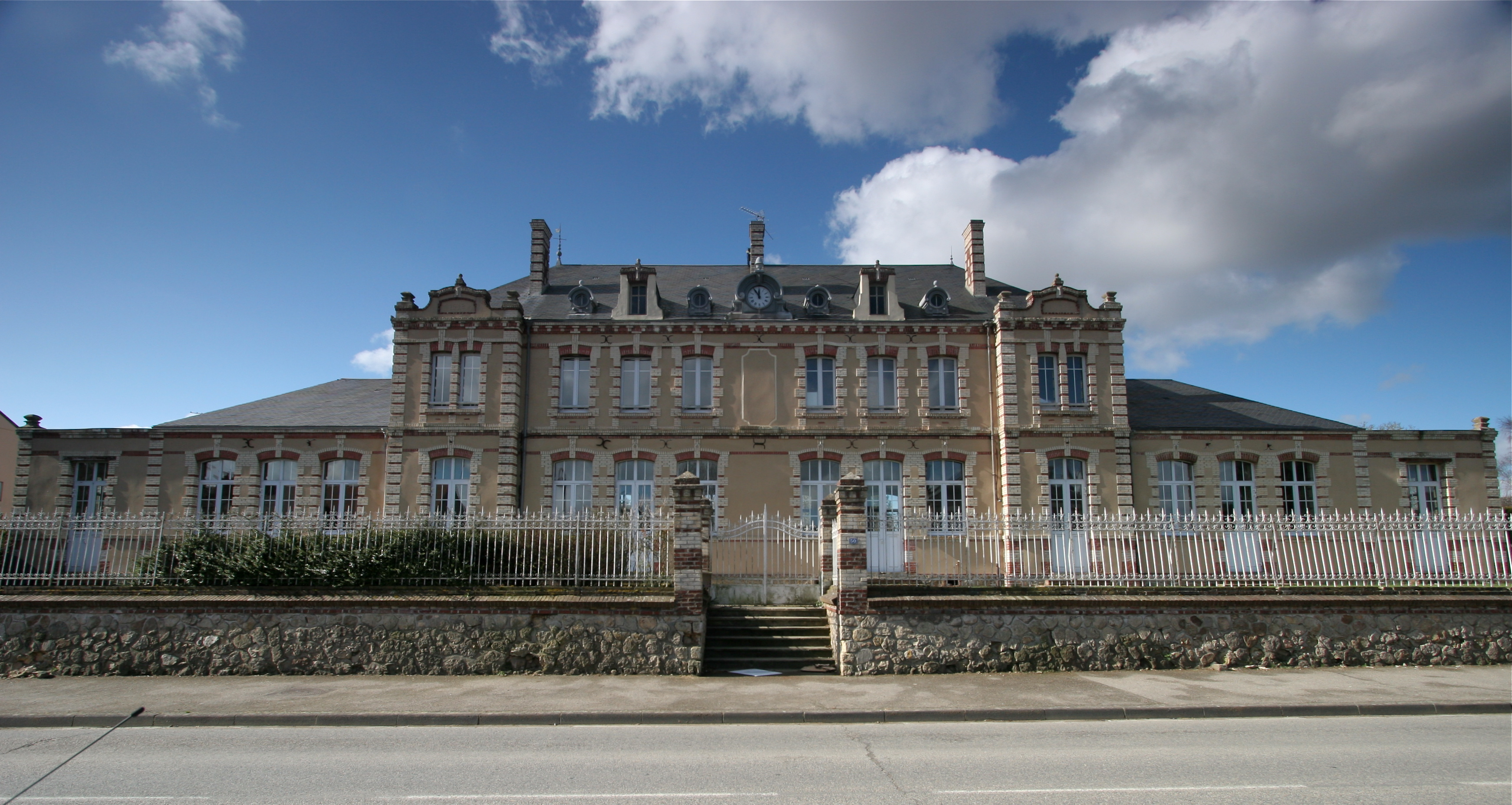 Ancienne école des filles devenu depuis peu la nouvelle Mairie, Potigny, Calvados